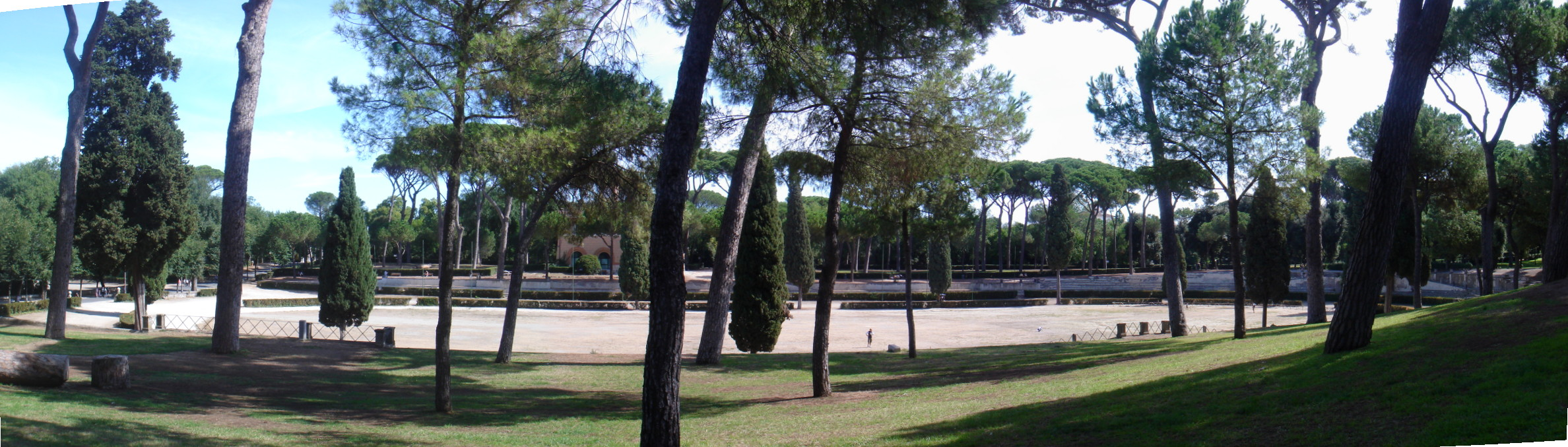 Roma, Villa Borghese: Piazza di Siena